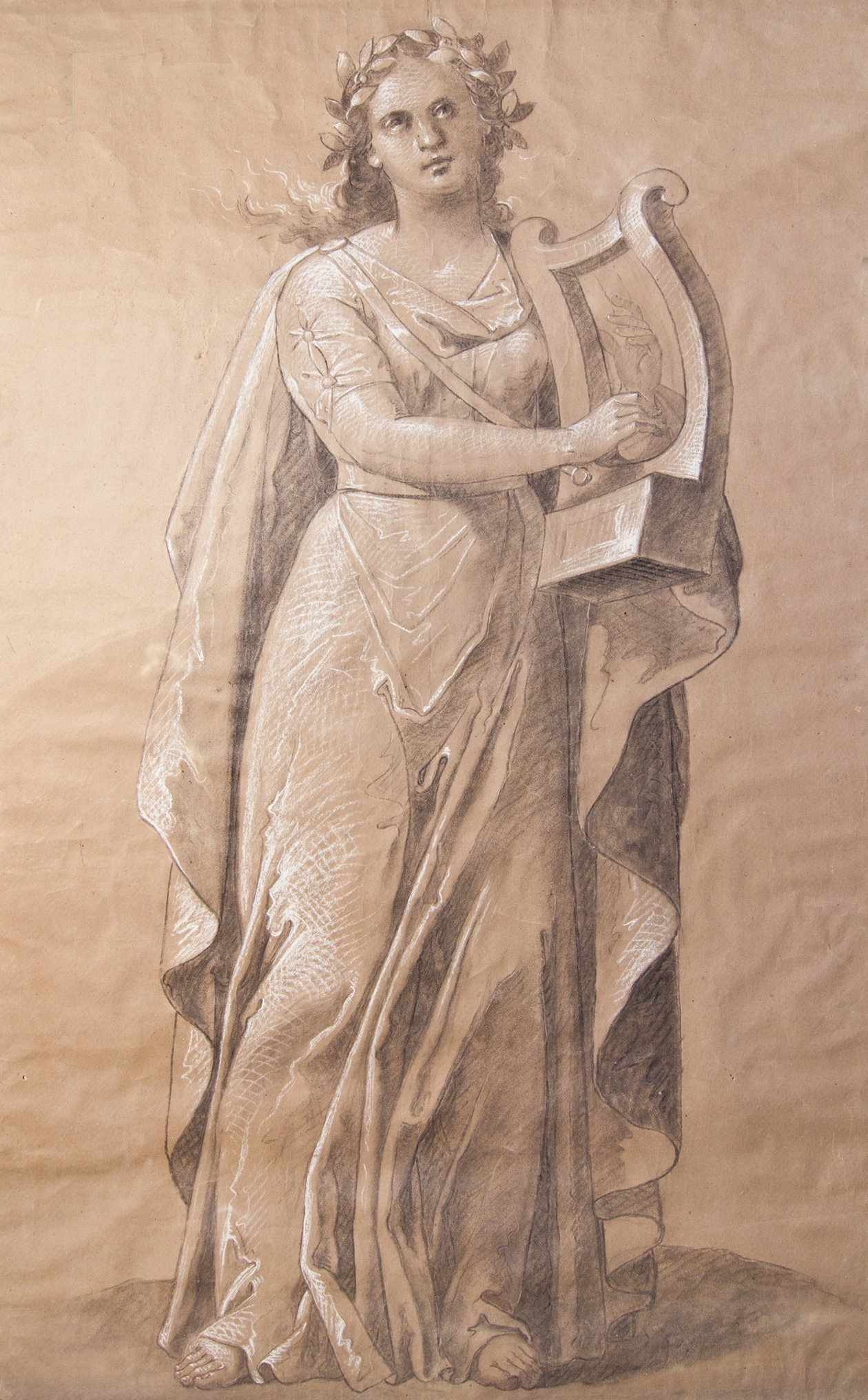 Terpsihora – muza dansului și a muzicii, desen de mari dimensiuni, 173x118 cm, executat în cărbune, cretă și creion, pe hârtie. - Muzeul Gheorghe Tattarescu